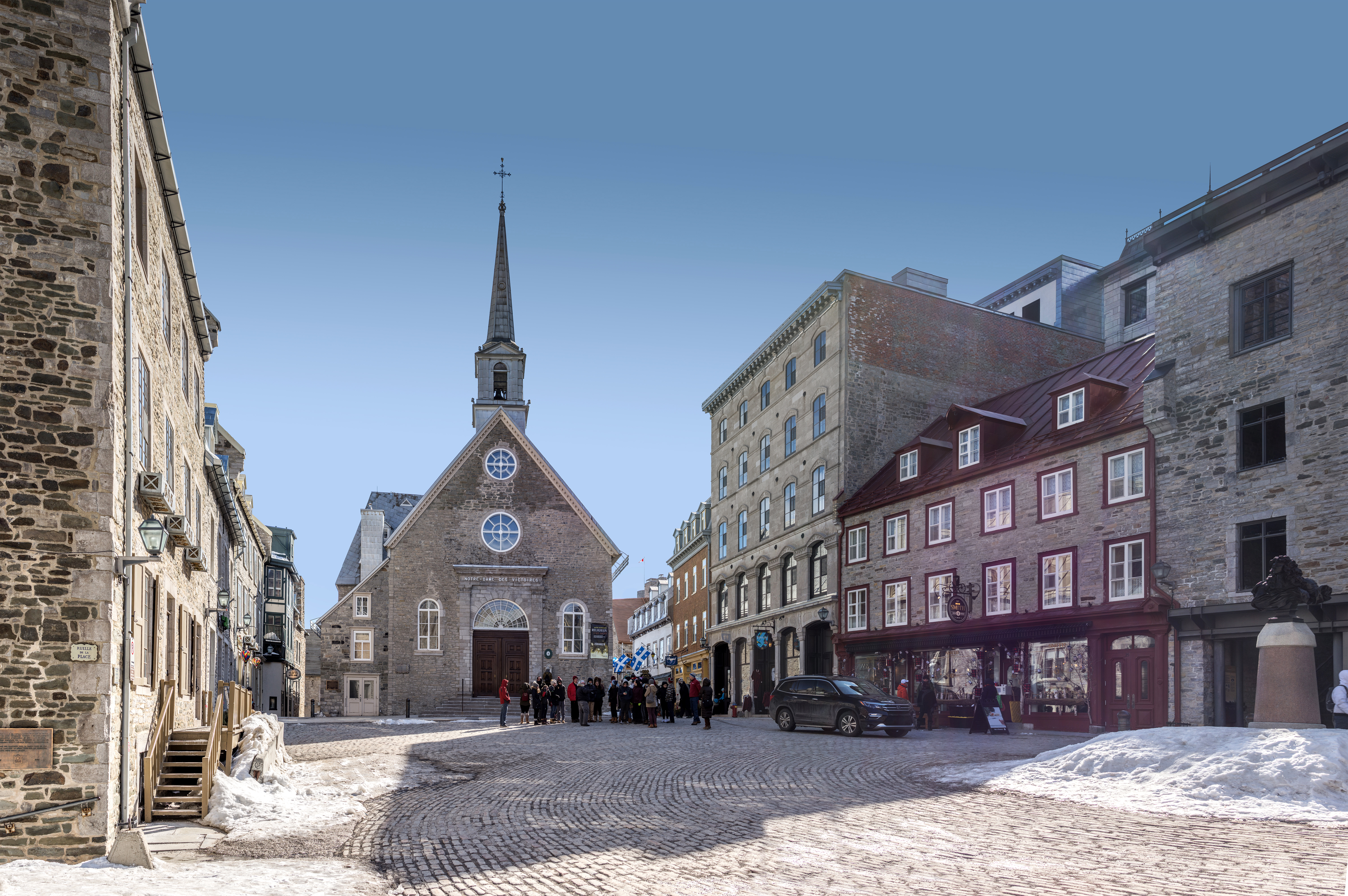 Iglesia de Notre-Dame-des-Victoires